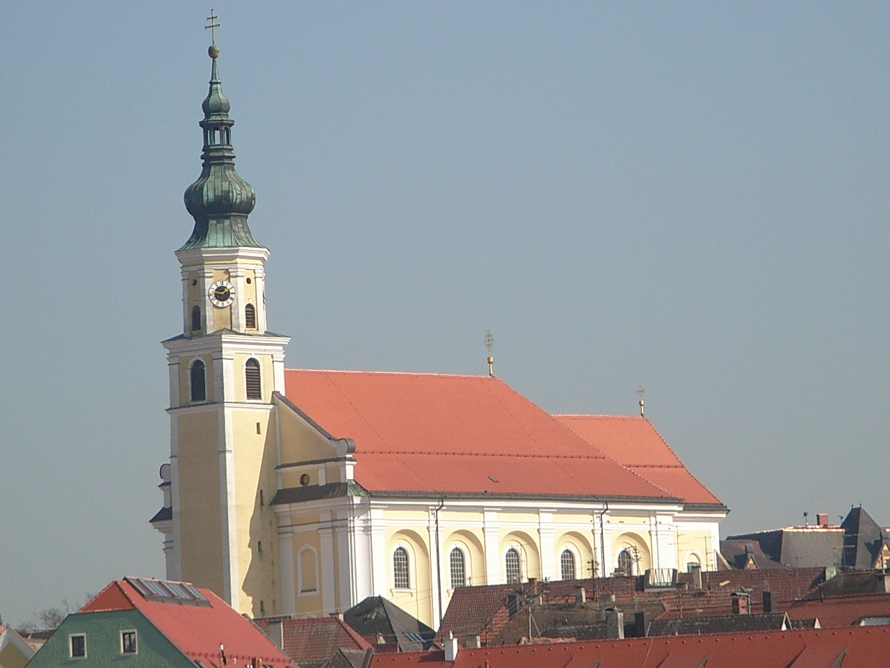 Pfarrkirche St. Georg, Schärding